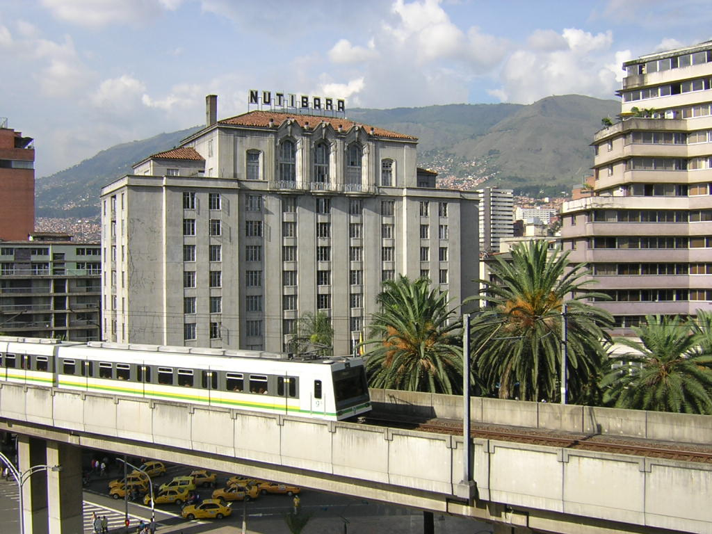 Hotel Nutibara, Medellín, Colombia